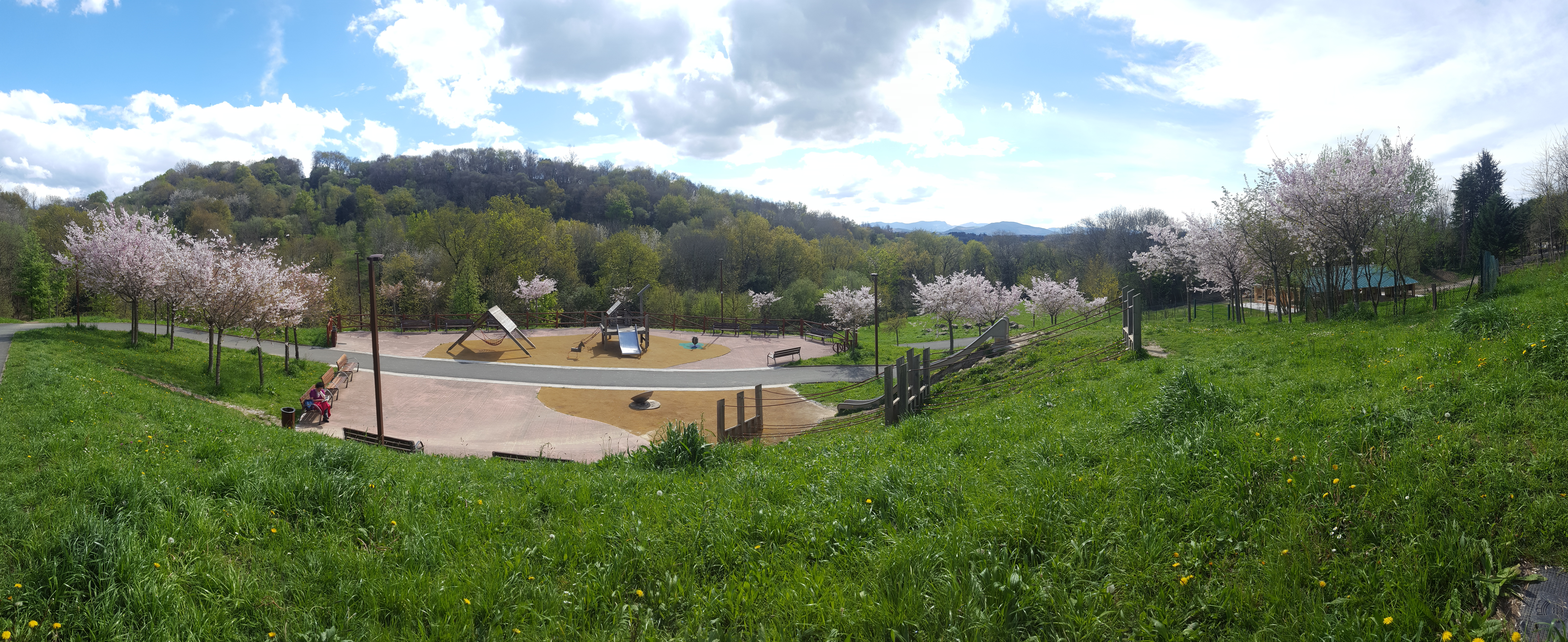 Ametzagaina parkea martxoan okaranondoak loretan